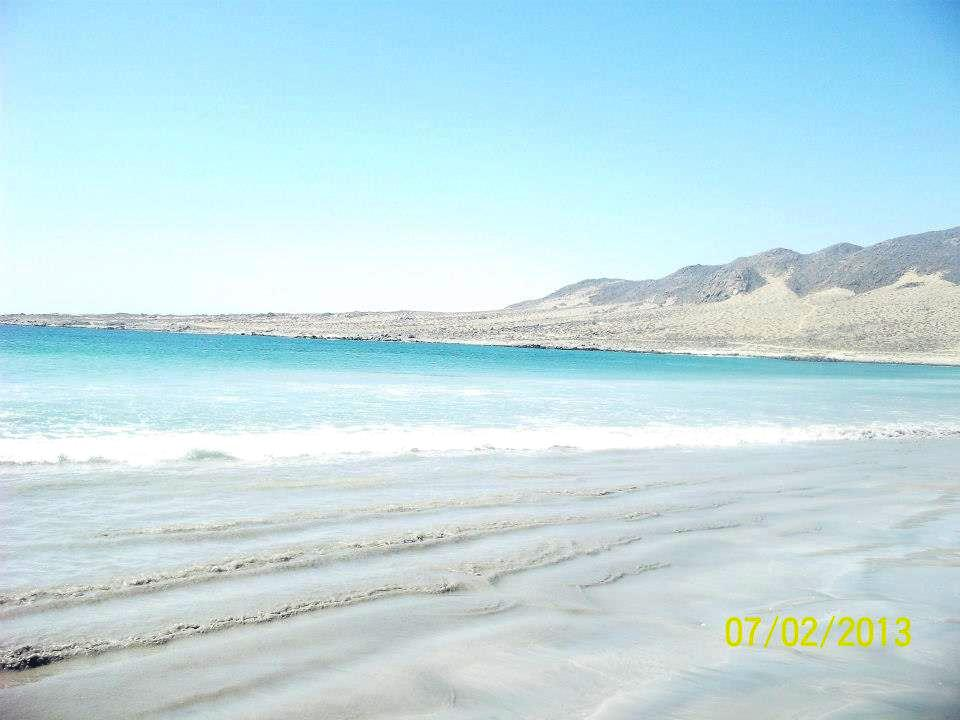 Caleta que se ubica en la nueva ruta costera que va desde desde Huasco hasta Caldera. Este camino esta asfaltado con sales y se mantiene en buenas condiciones. Caleta Pajonales cuenta con acceso directo. De aguas color turquesa y playa de arena blanca y finas, se observa este paraje en medio del paisaje desértico costero.